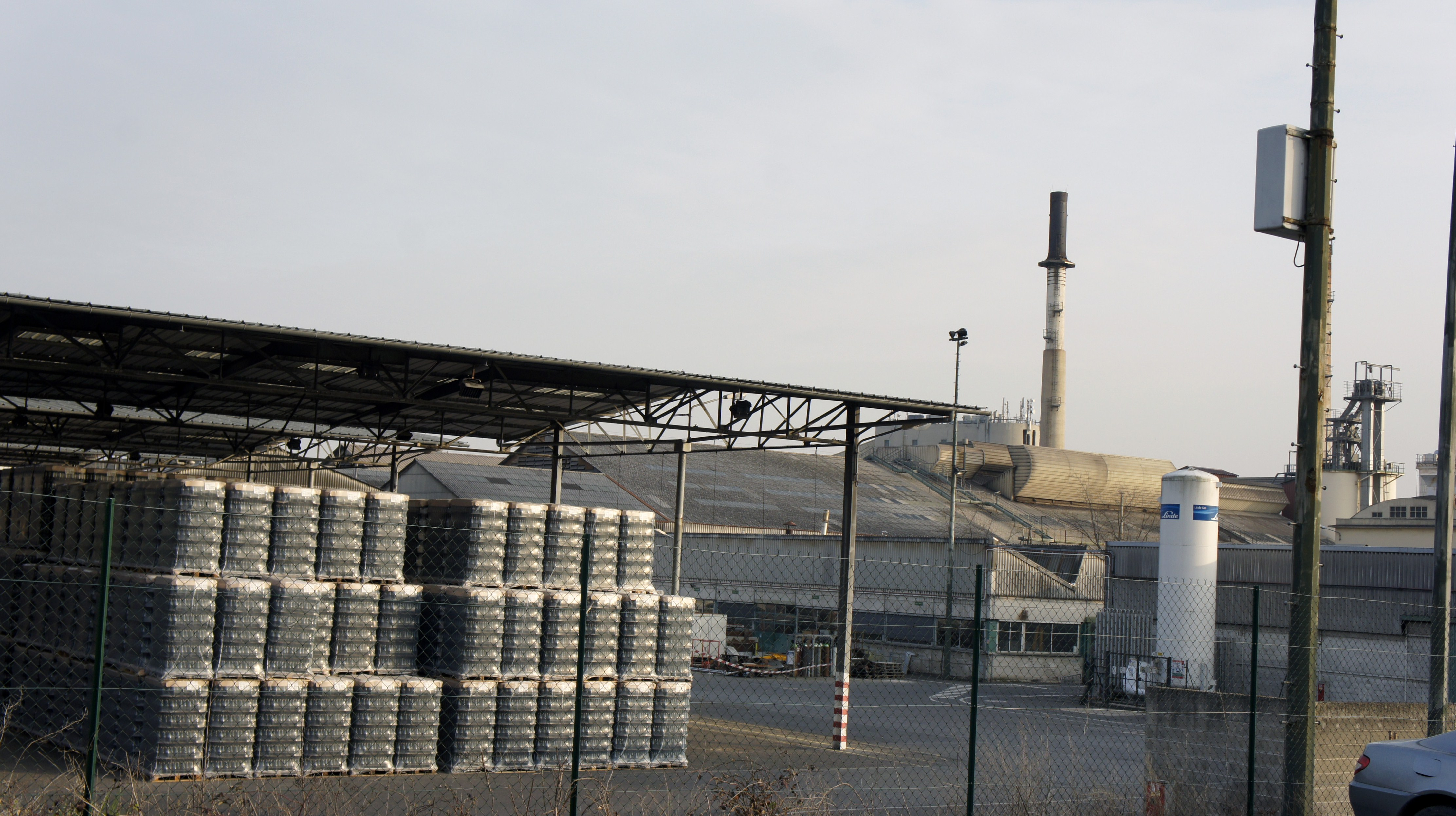 Dans le quartier Verrerie de Reims, le four, le stock de bouteilles de la verrerie Charbonneaux.